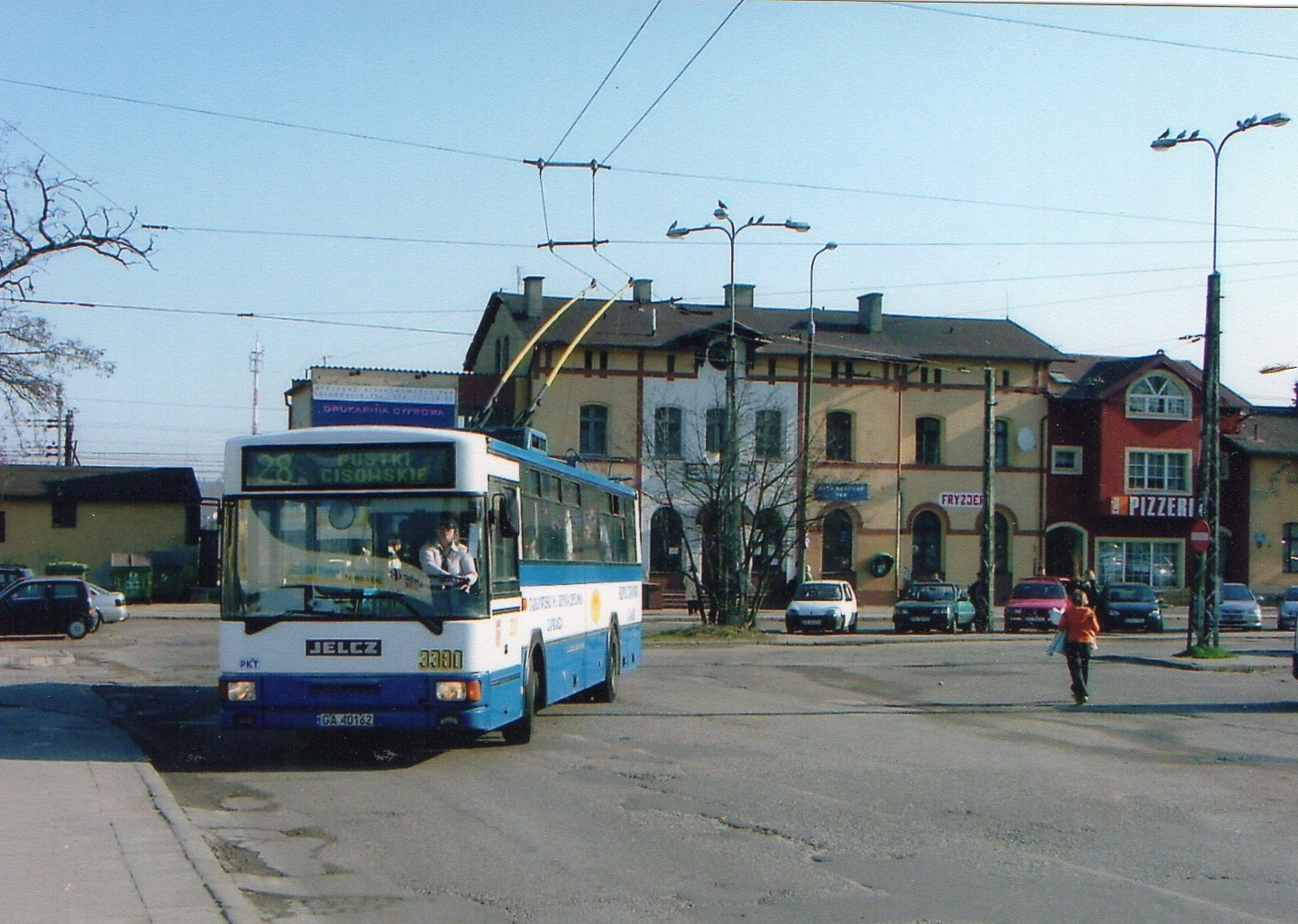 Plac Dworcowy, trolejbus na tle dworca Gdynia Chylonia. 31.03.2007 r.